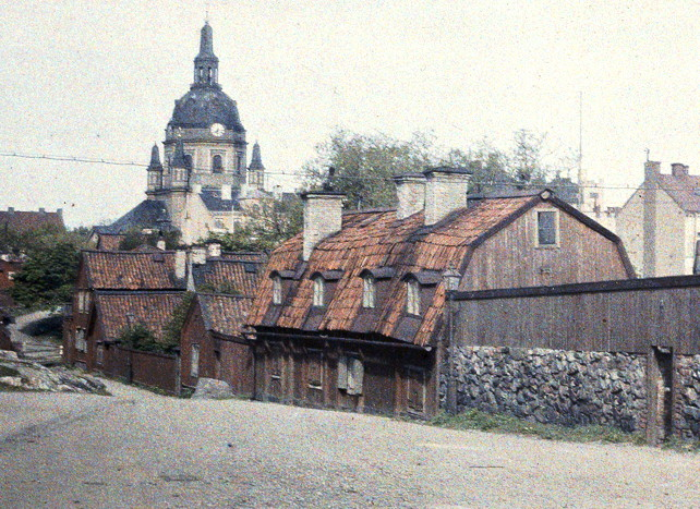 Stigbergsgatan västerut